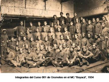 Esta es una imagen del primer cuerpo de Grumetes abordo del MC "Boyaca" en el año 1934